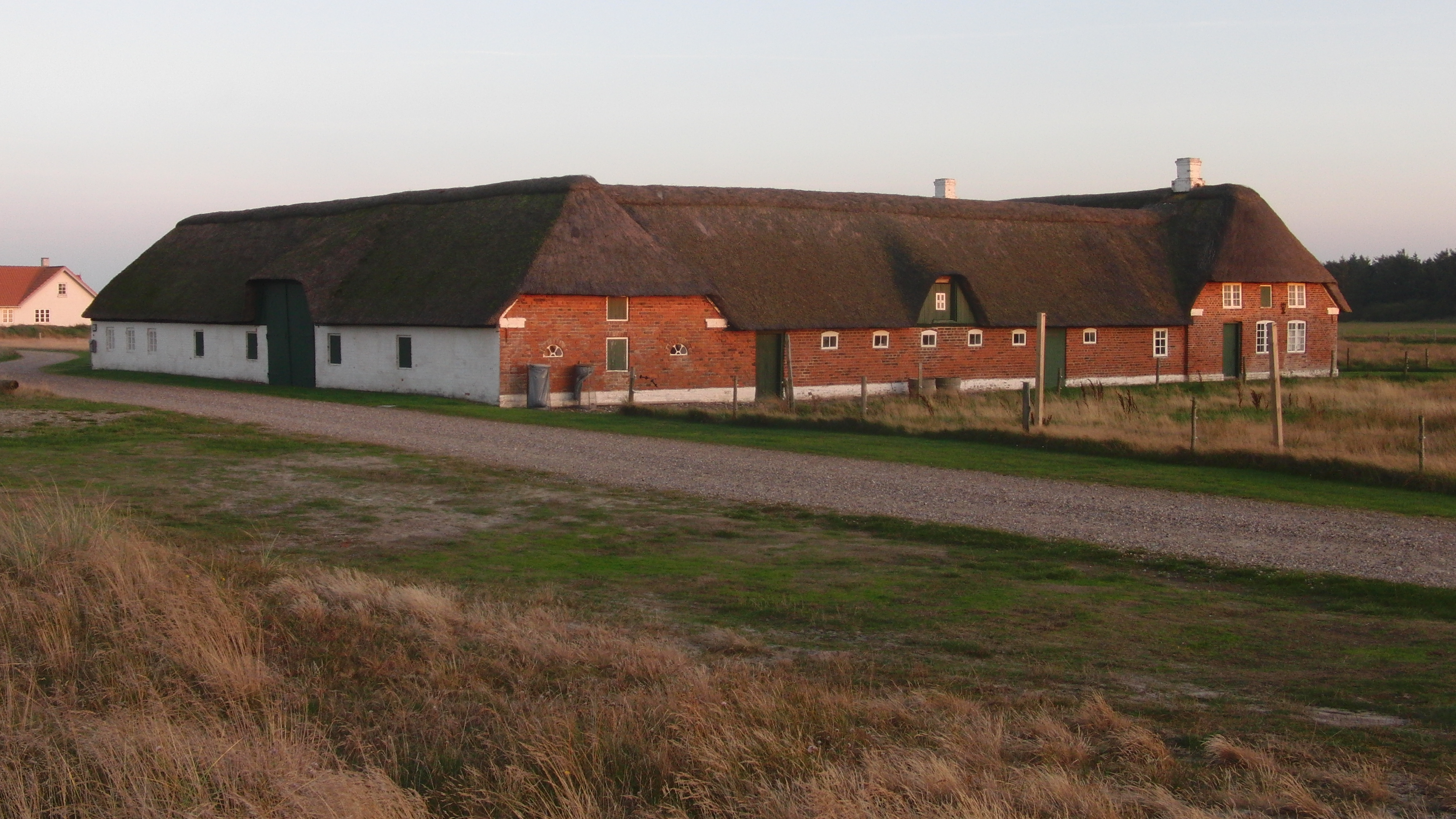 Abelines Gaard in Nørre Havrvig in Hvide Sande ist die ehemalige Strandvogtei / Hof des Strandhauptmannes. Erbaut zwischen 1854 und 1871. Heute Teil des Ringkøbing-Skjern Museums